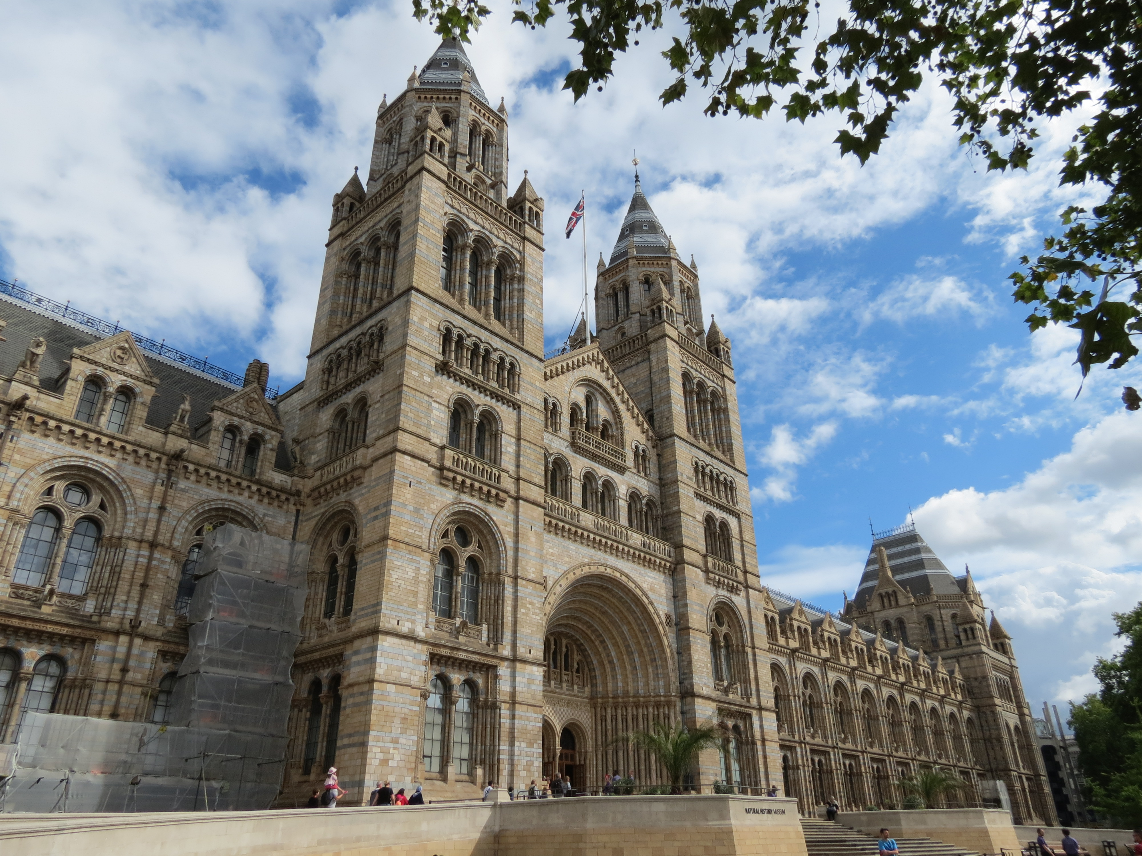 Museum d'Histoire Naturelle de Londres.